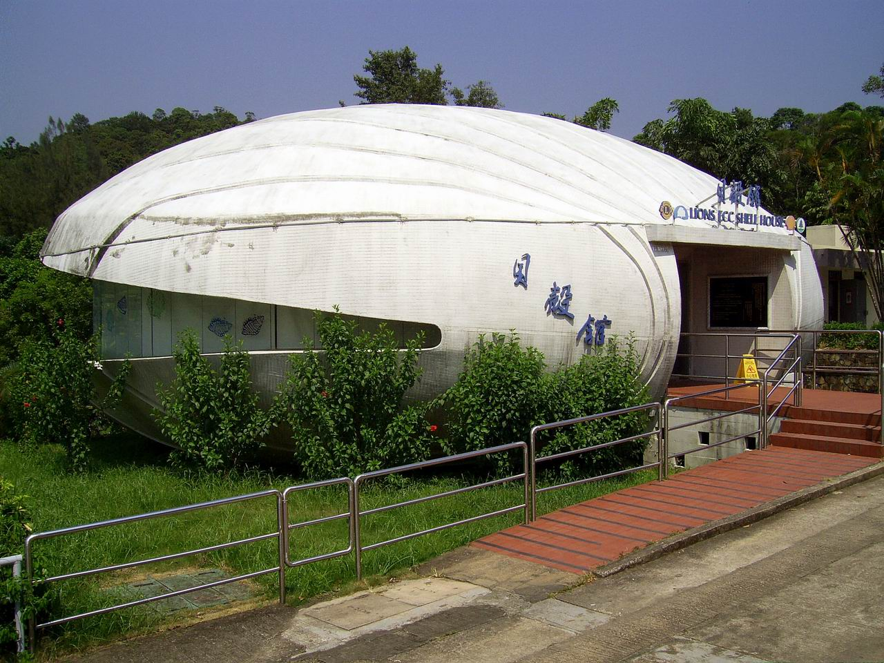 中文（香港）: 獅子會自然教育中心「貝殼館」